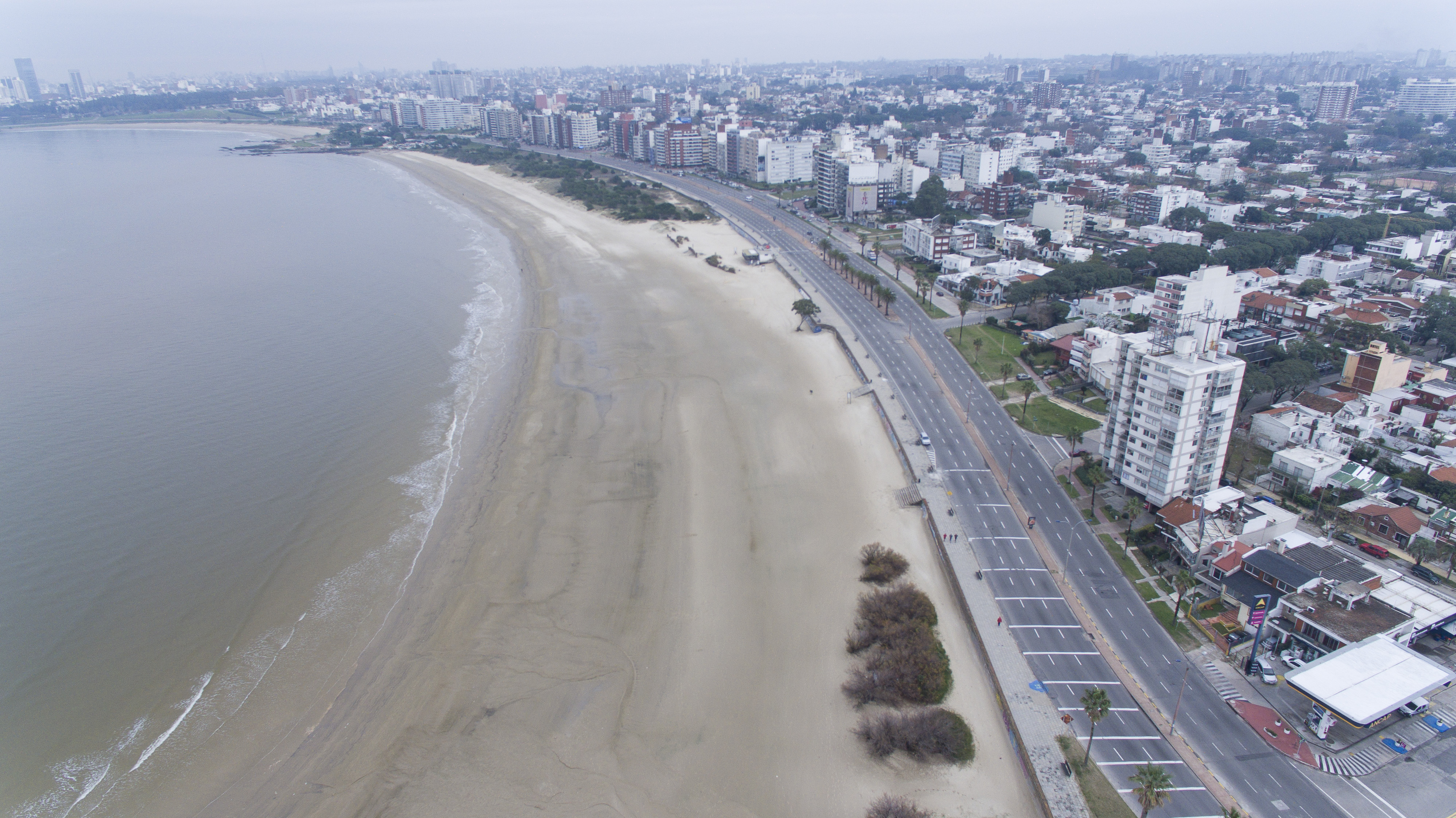 Playa Malvin, Montevideo, Uruguay